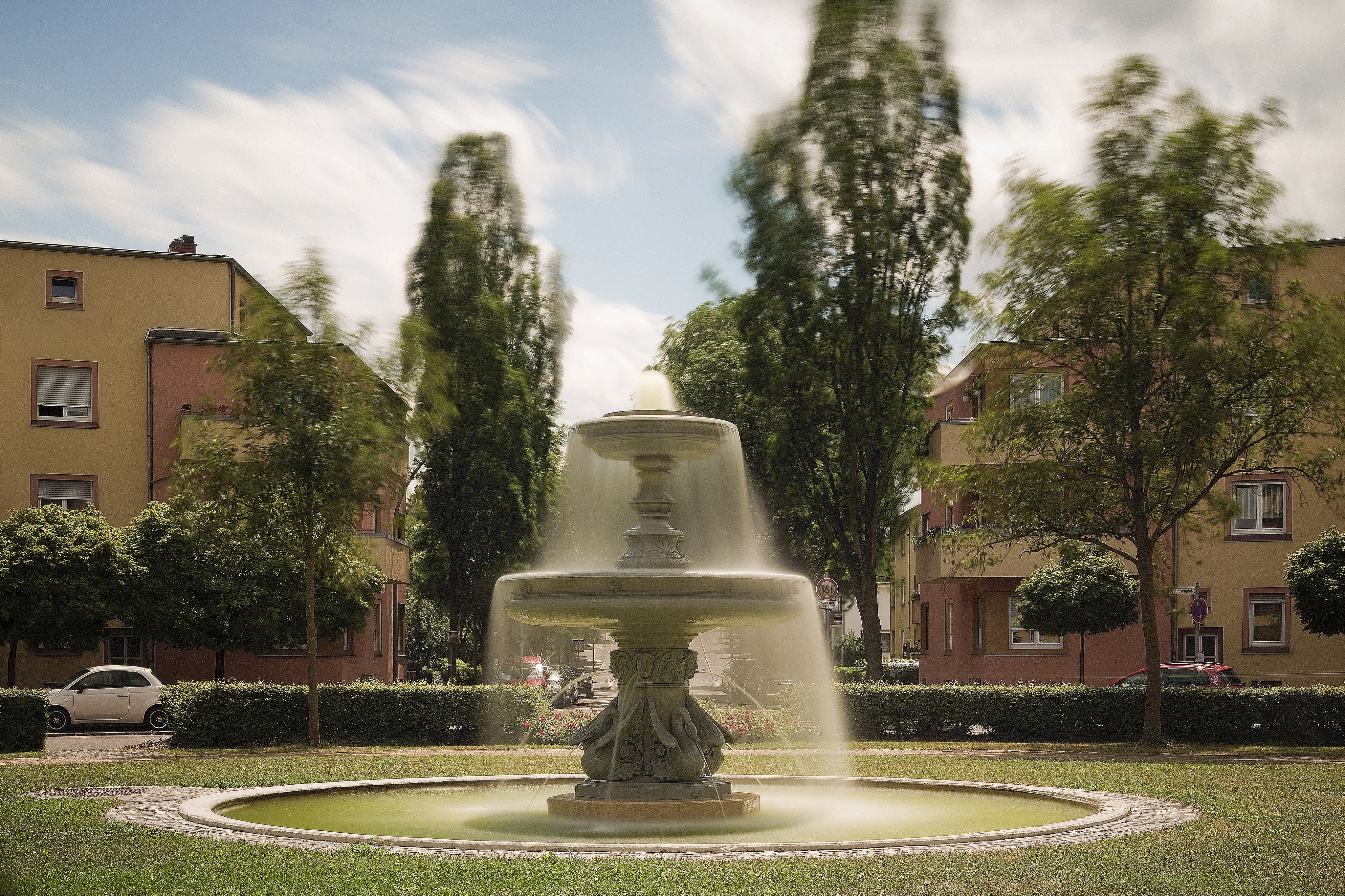 Der Beethovenplatz während der Sommermonate.